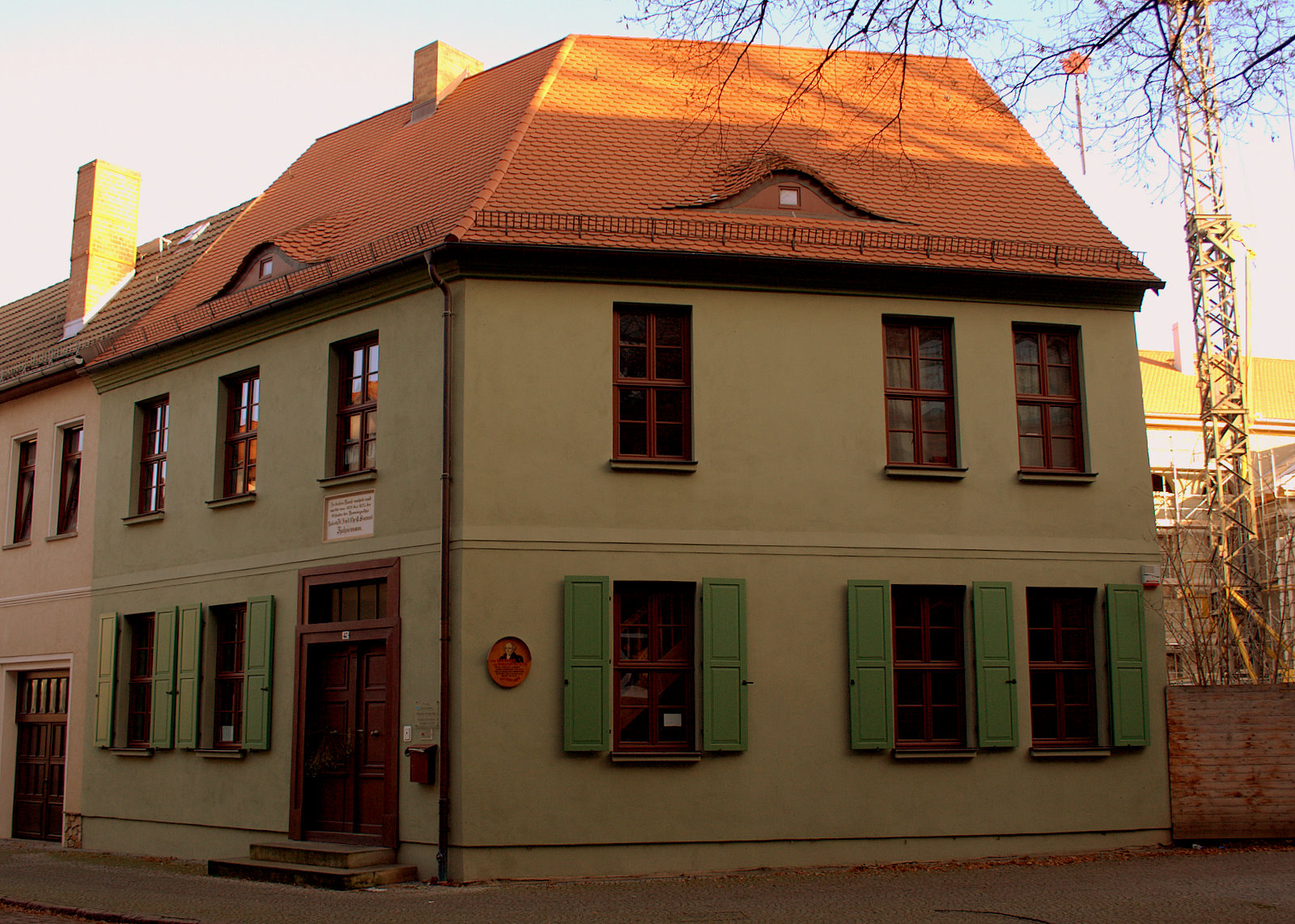 Wohn- und Arbeitshaus von S.Hahnemann in Köthen